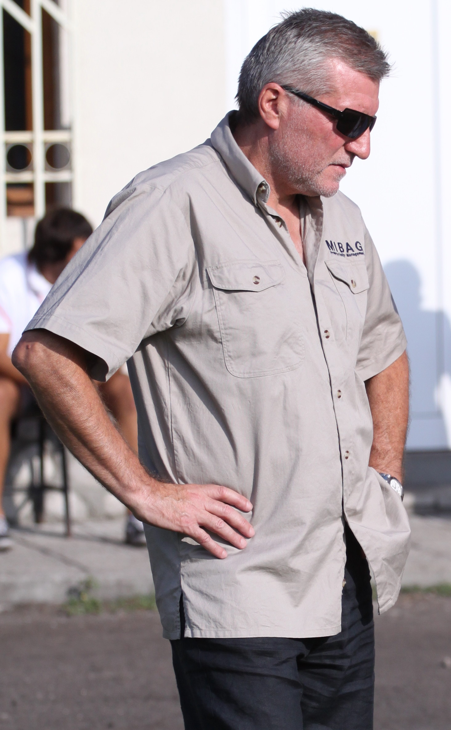 Войн Войнов . бивш български футболист, нападател, понастоящем треньор, старши треньор на ФК Банско.